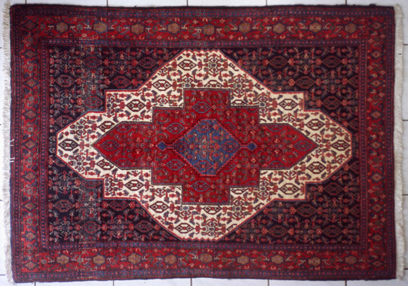 Senneh-Teppich / Rug from Senneh, Iran